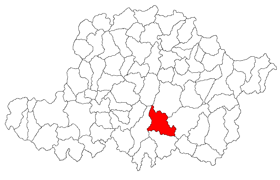 Categorie:Hărţi ale judeţului Arad